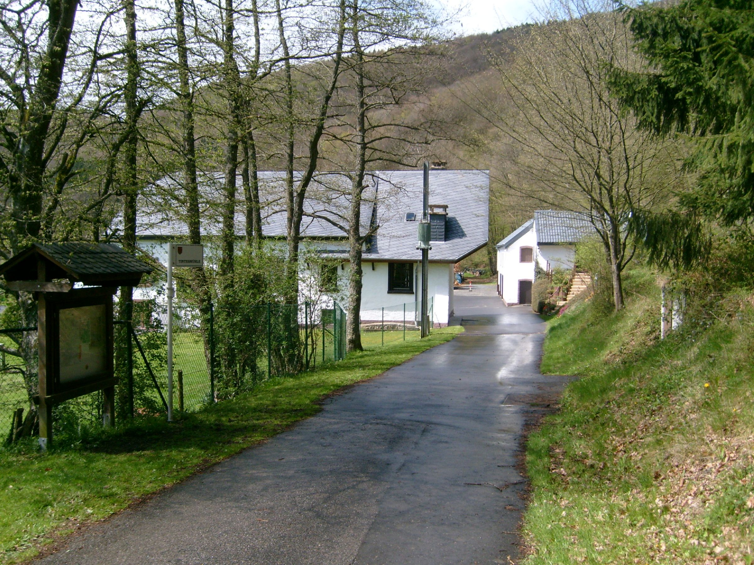 Tëntesmillen.